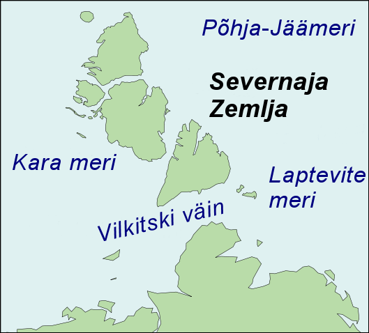 Vilkitski väina asukoht